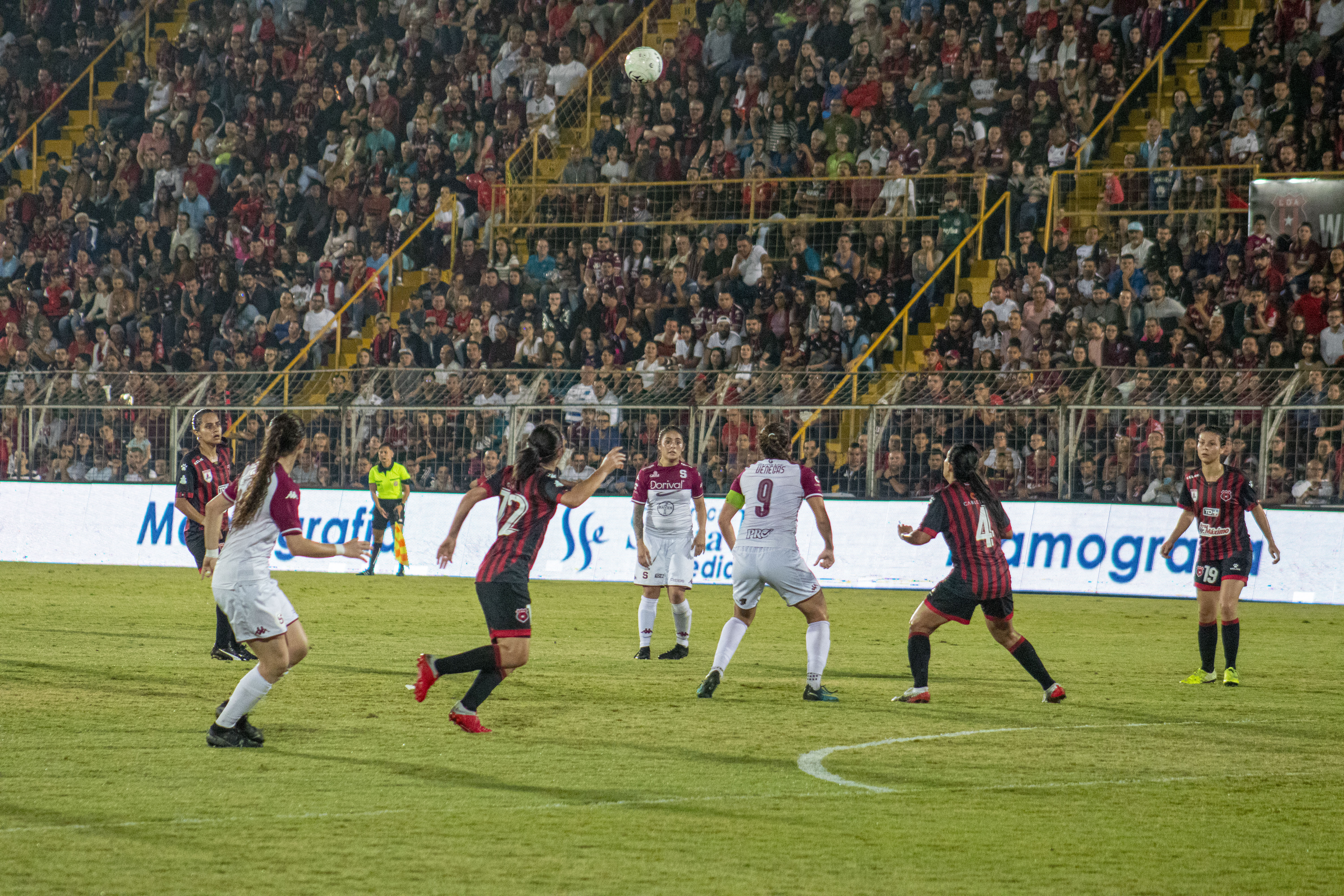 Saprissa FF y CODEA-LDA se disputan la pelota en el aire, en la final de la Primera División Femenina de Costa Rica.